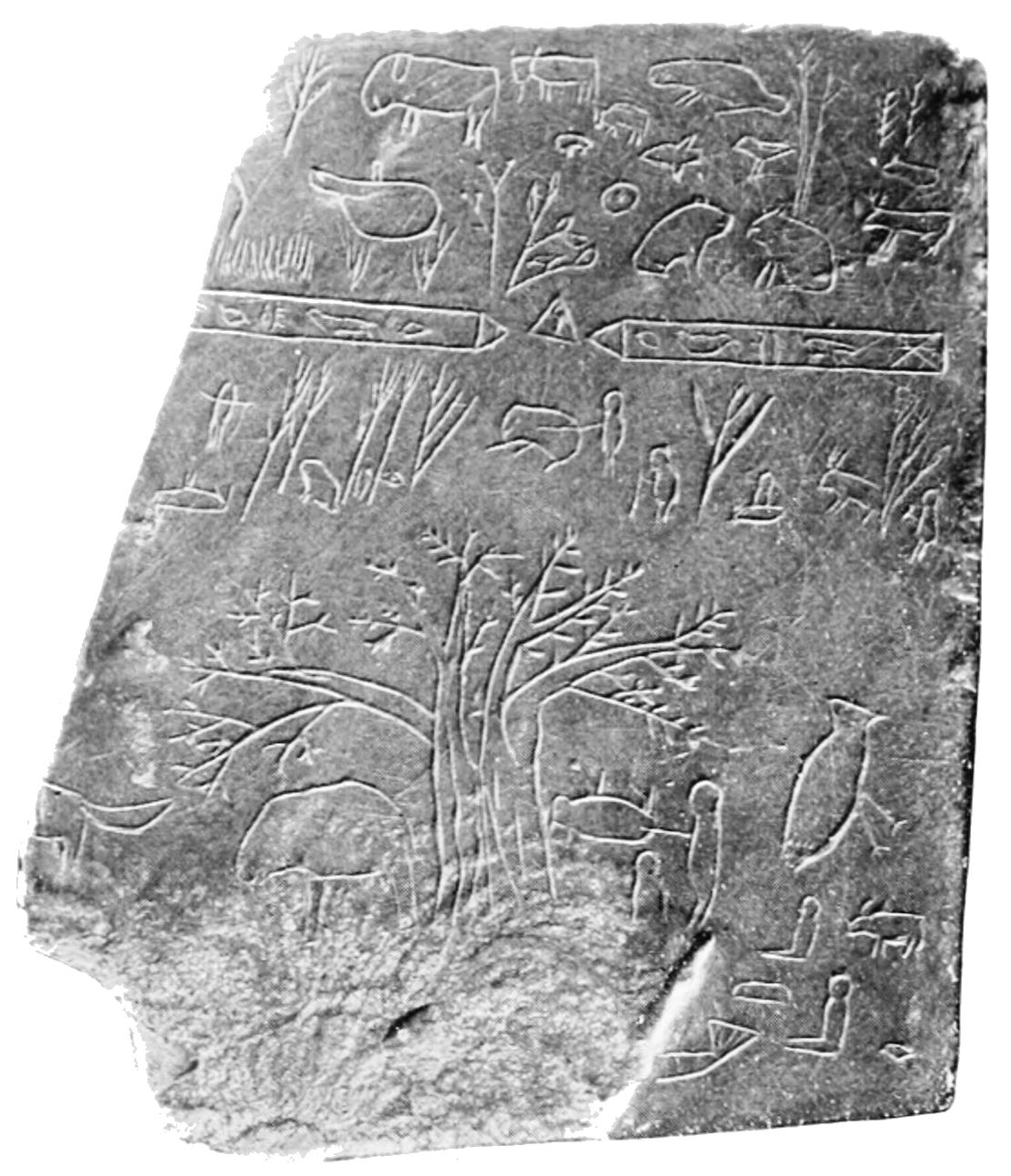 Slate tablet from Davenport